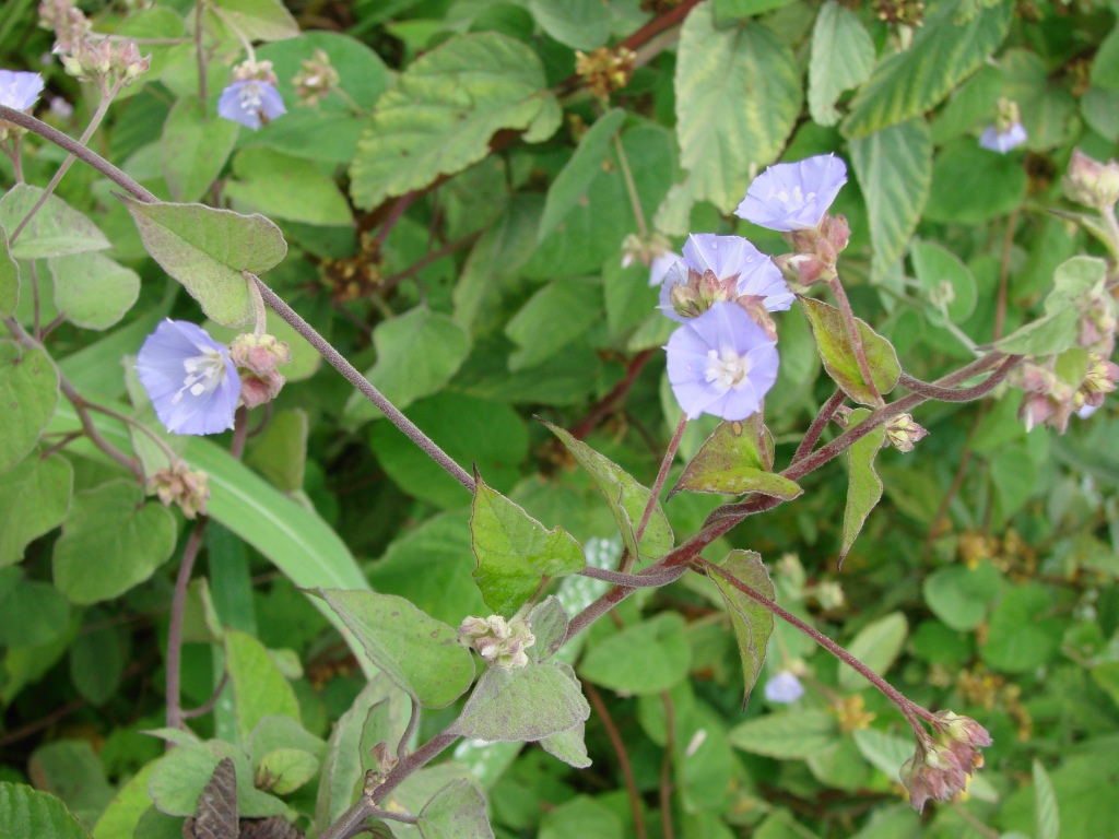 Jacquemontia agrestis (Choisy) Meisn. - CONVOLVULACEAE - BR 242 - Cristópolis - Bahia - Brasil.